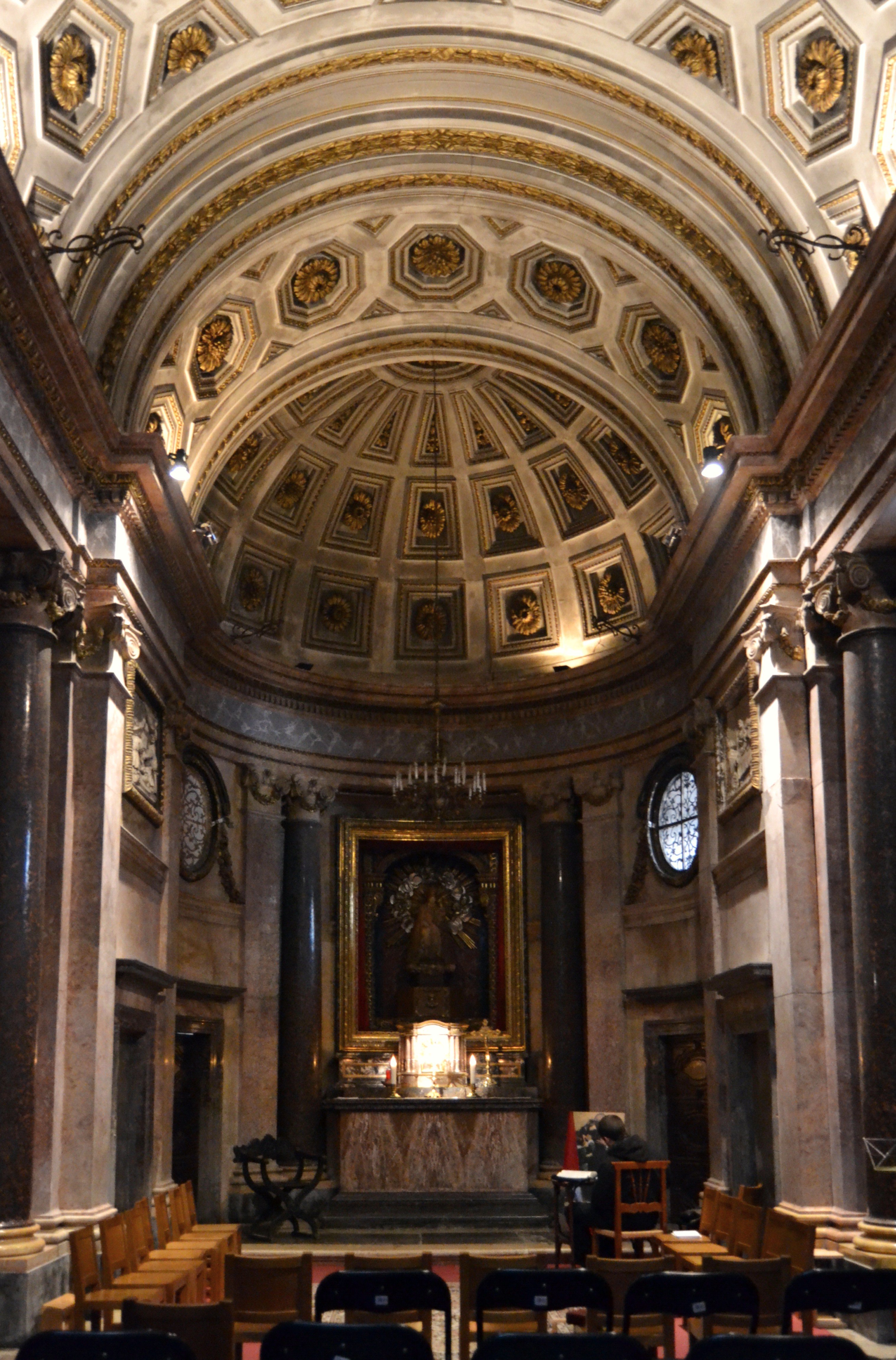 Església del temple de València, capella de la Comunió.